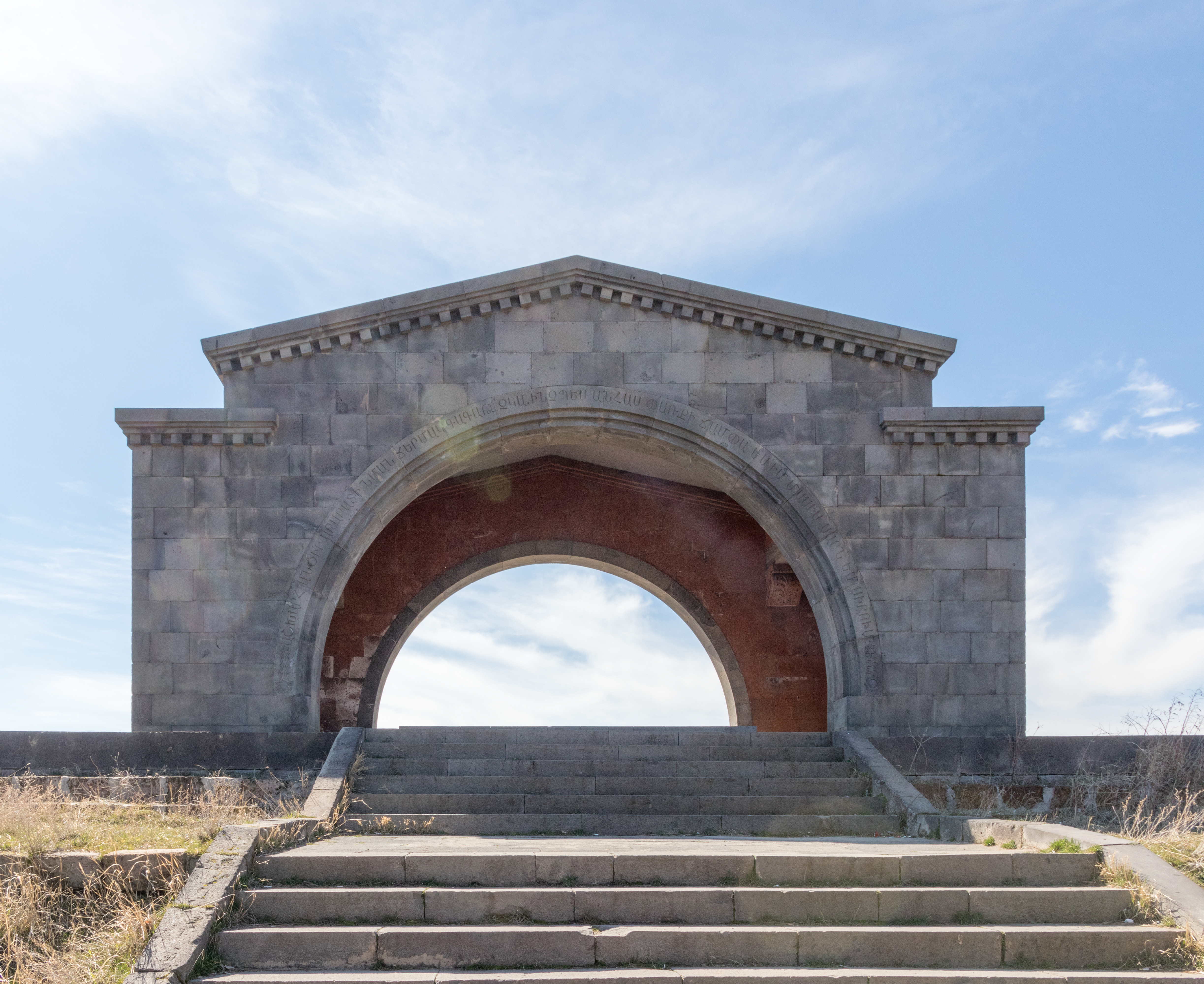 Charent's Arch